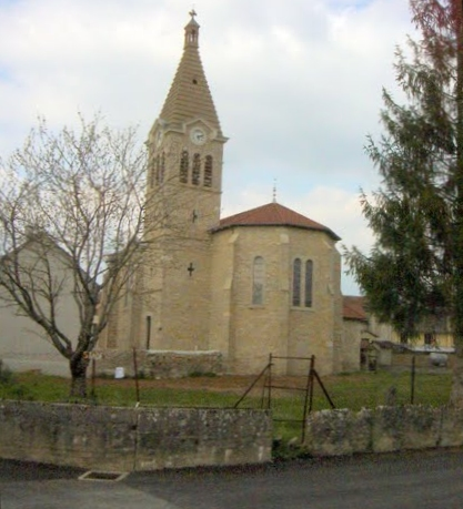 Eglise